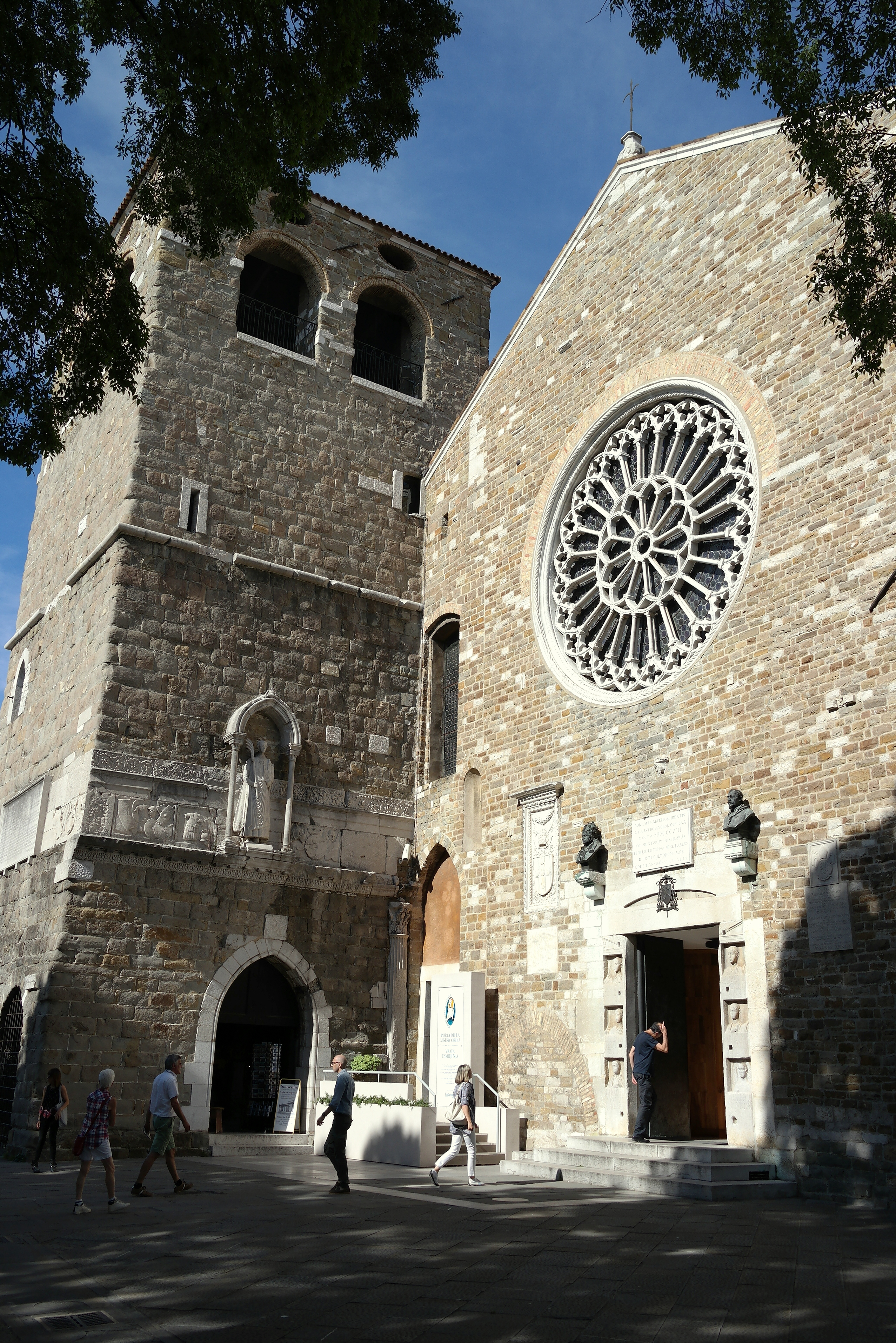 Cattedrale di San Giusto a Trieste